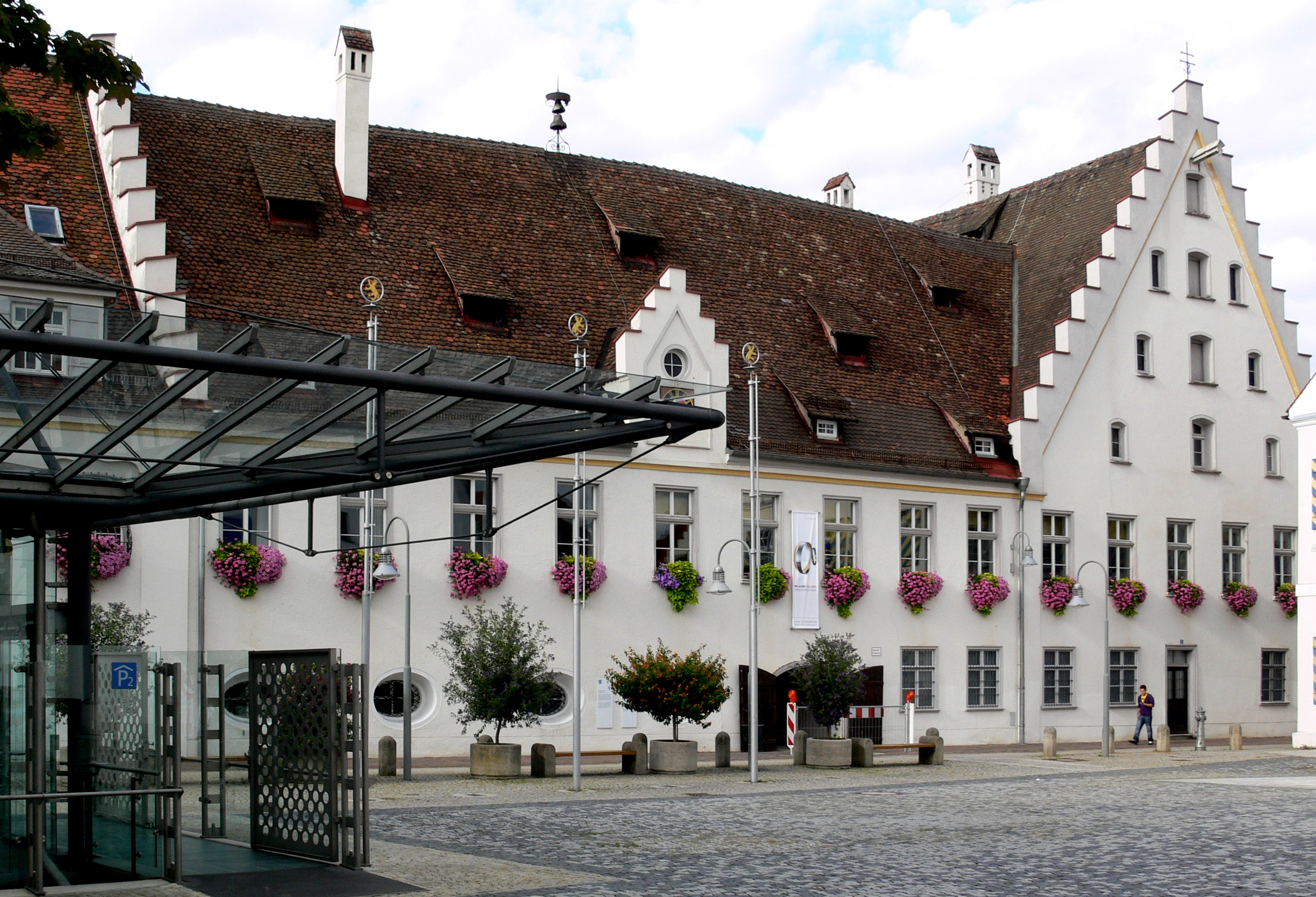 Biberach an der Riß Heilig-Geist-Spital, Fassade zur Viehmarktstraße